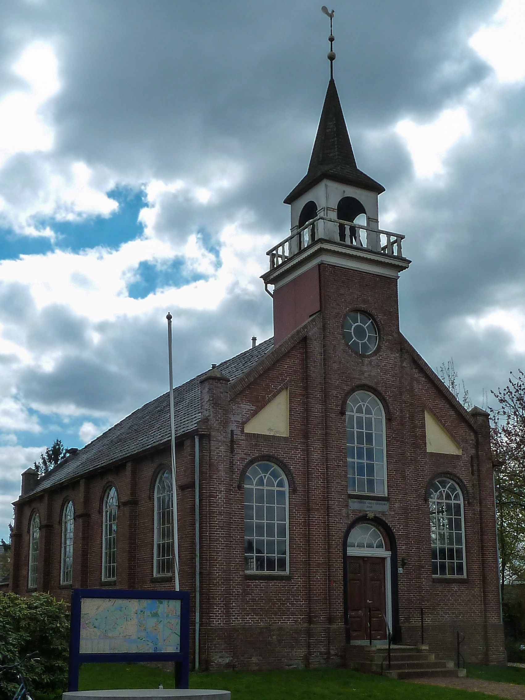 Voormalige hervormde kerk van Overschild